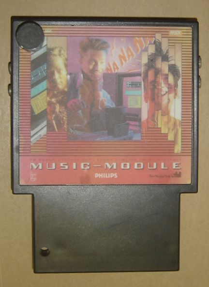 Music Module (met aparte volumeknop) Philips Music Module NMS-1205 (MSX cartridge) FM sound synthesizer, Sound sampler, & MIDI interface using Yamaha Y8950, no MSX-Audio BIOS (User's Guide)